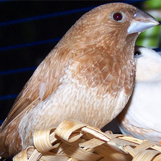 Japanisches-Moevchen